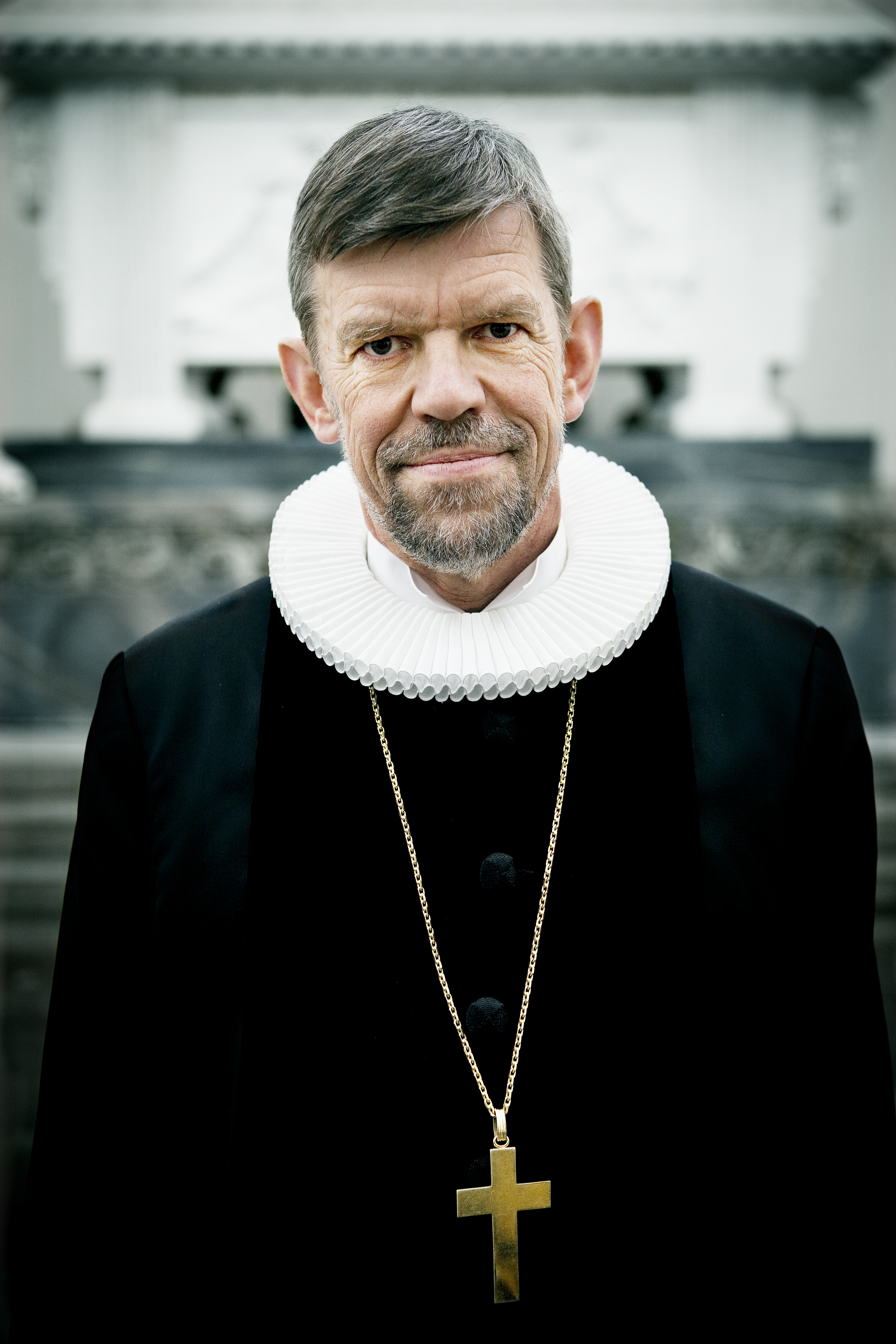 Biskop Peter Fischer-Møller fra Roskilde Stift.